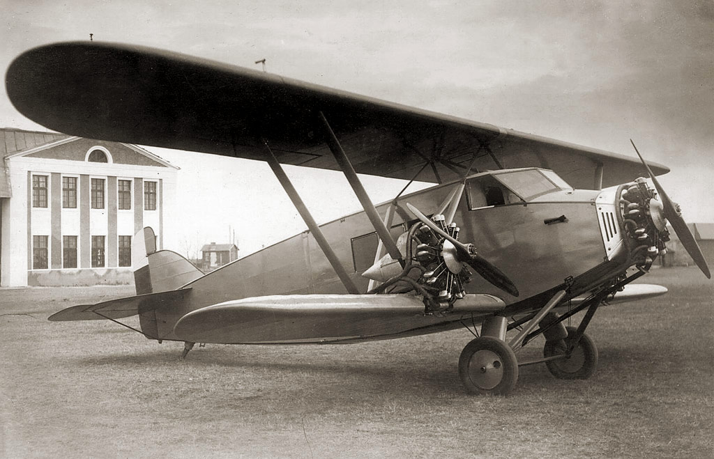 Bulgarischen Flugzeug DAR-4A frt Staatlichen Flugzeug Fabrik in Bozhurishte, 30er Jahren des zwanzigsten Jahrhunderts